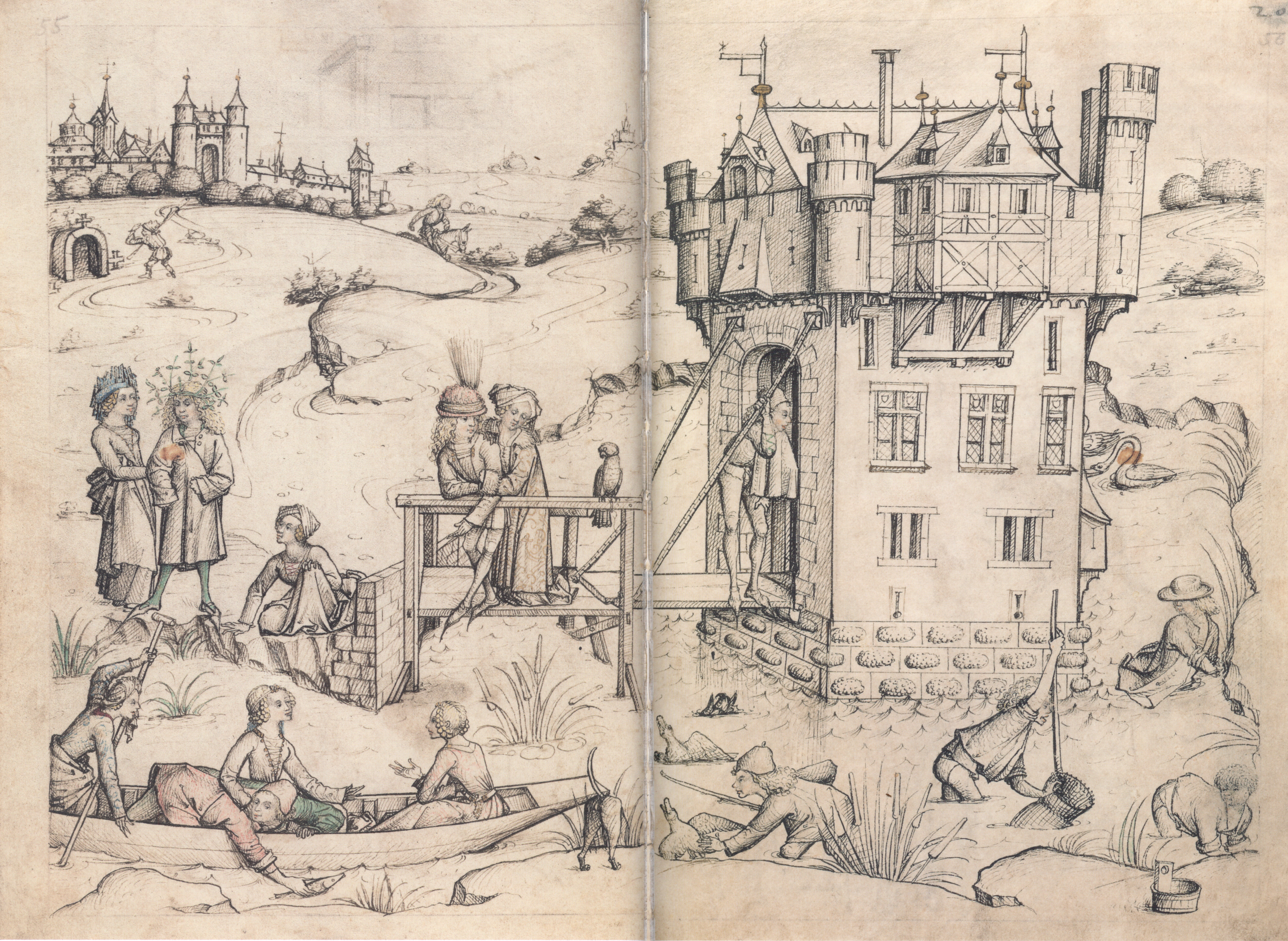 Mittelalterliches Hausbuch von Schloss Wolfegg Doppelseite fol. 19v–20r (Wasserburg)